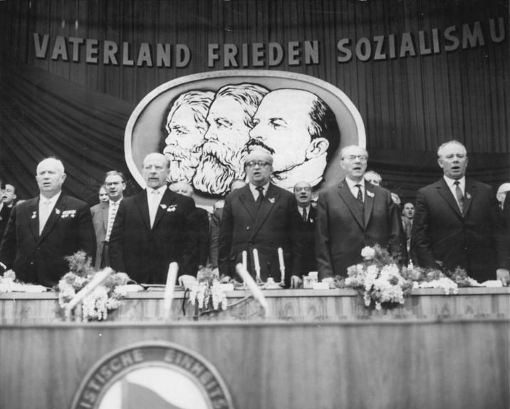 Zentralbild Kollektiv Me-Qu 21.1.1963 VI. Parteitag der SED vom 15.-21.1.1963 in der Werner-Seelenbinder-Halle in Berlin (6.Tag). UBz. Zum Abschluß des Parteitages sangen Delegierte und Gäste die "Internationale". V.l.n.r.: Der Erste Sekretär des ZK der KPdSU N.S. Chruschtschow, der Erste Sekretär des ZK der SED Walter Ulbricht, die Mitglieder des Politbüros des ZK der SED Friedrich Ebert und Otto Grotewohl, und das Mitglied des Präsidiums des ZK der KPdSU und Erste Sekretär des ZK der PK der Ukraine, Nikolai Podgorny. (Junge)"